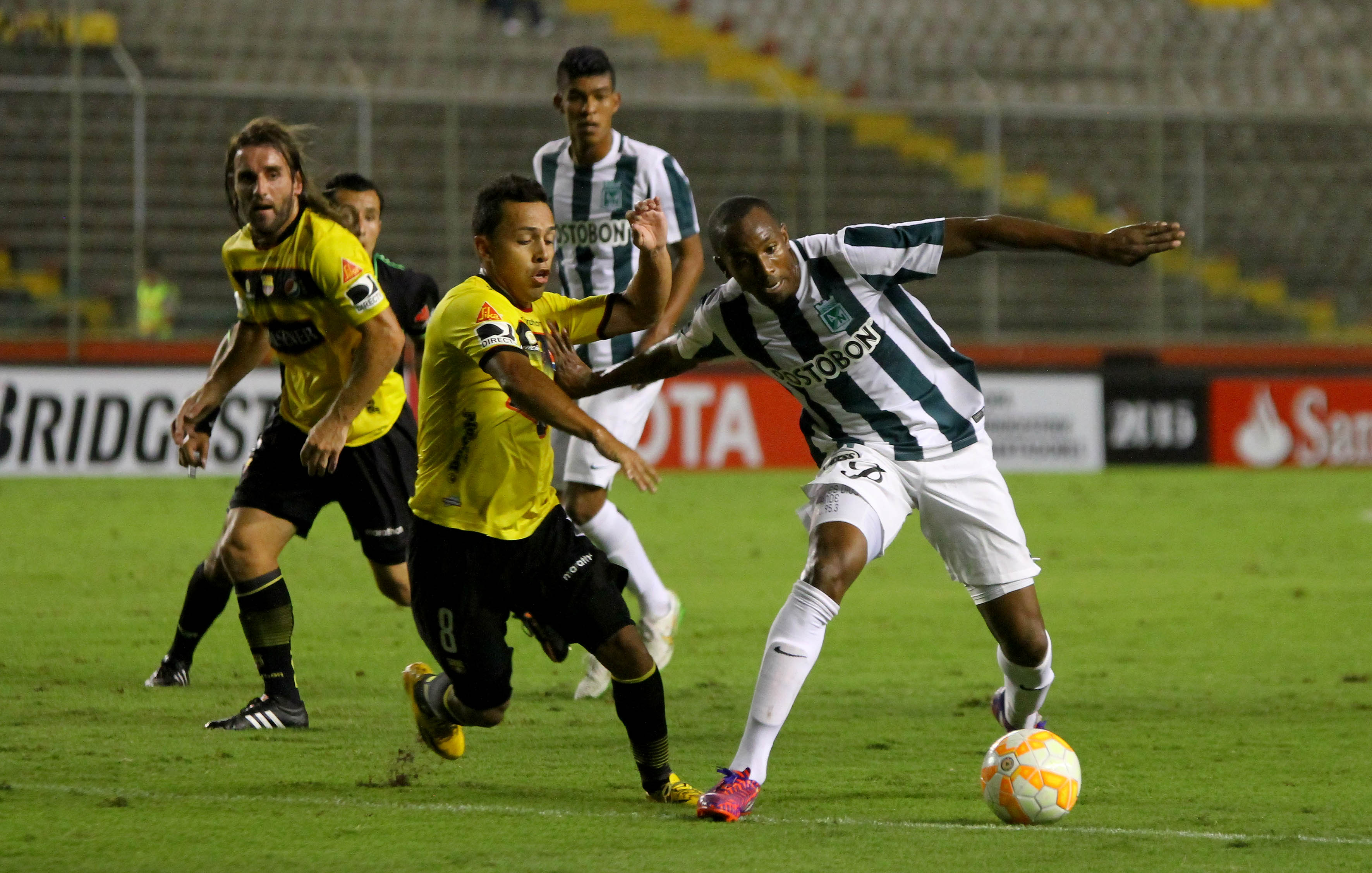 Guayaquil, Miércoles 11 de marzo del 2015 (ANDES).-Barcelona enfrenta a Atlético Medellín de Colombía por la Copa Libertadores Foto:César Muñoz/ANDES